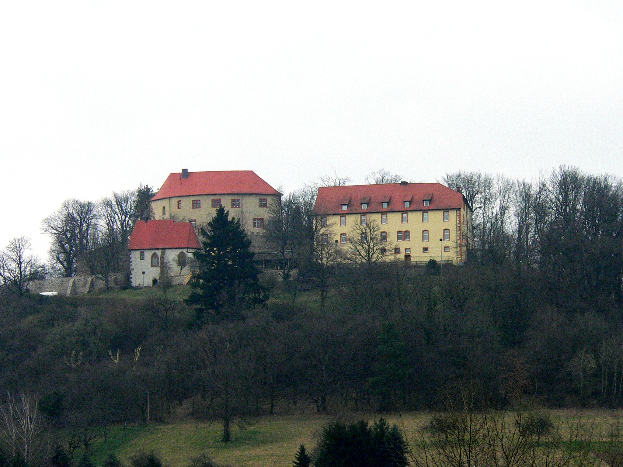 Totalansicht von Schloss Reichenberg in Reichelsheim, Odenwald, Hessen